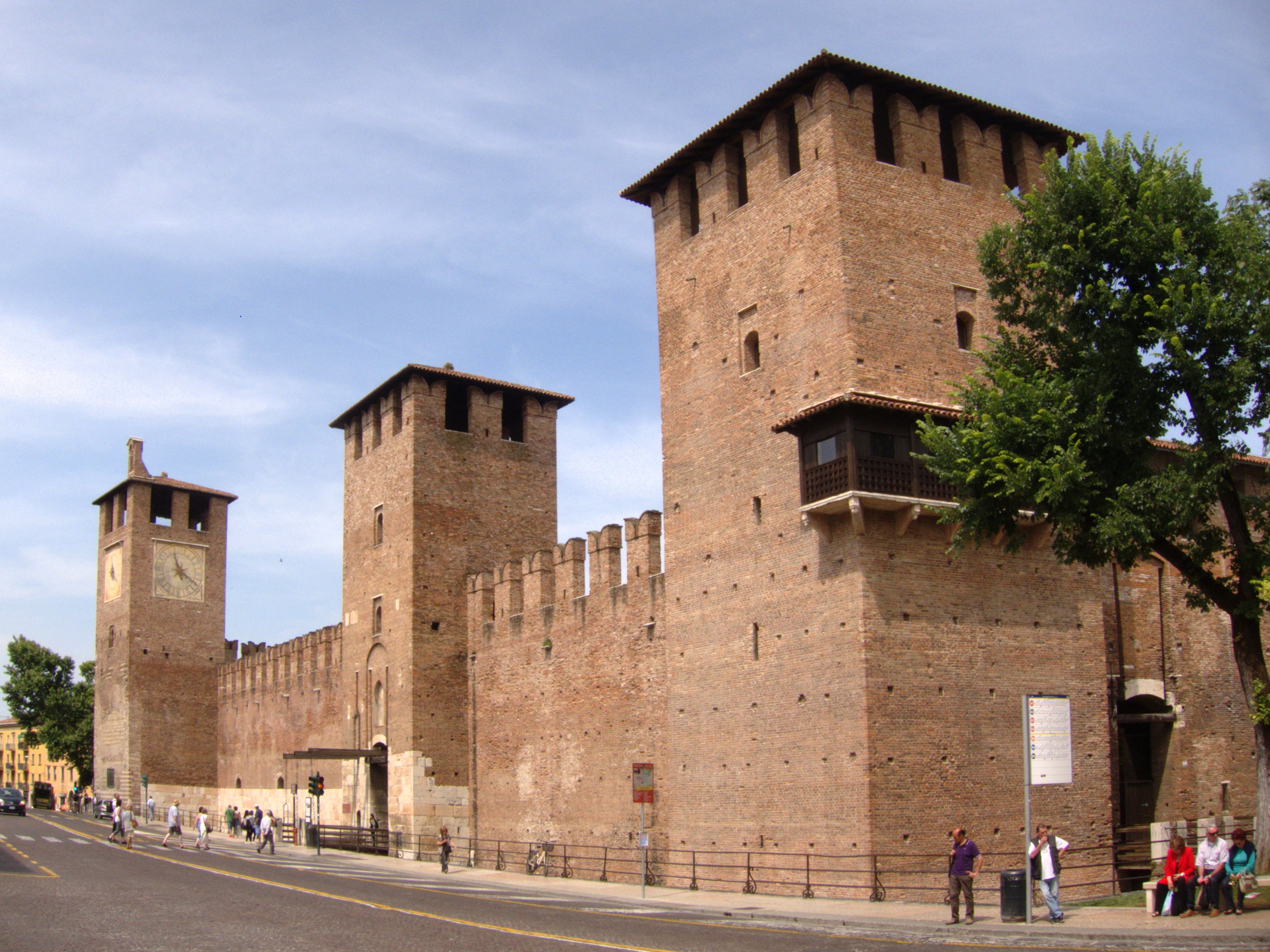 Castelvecchio, Verona, Corso Castelvecchio